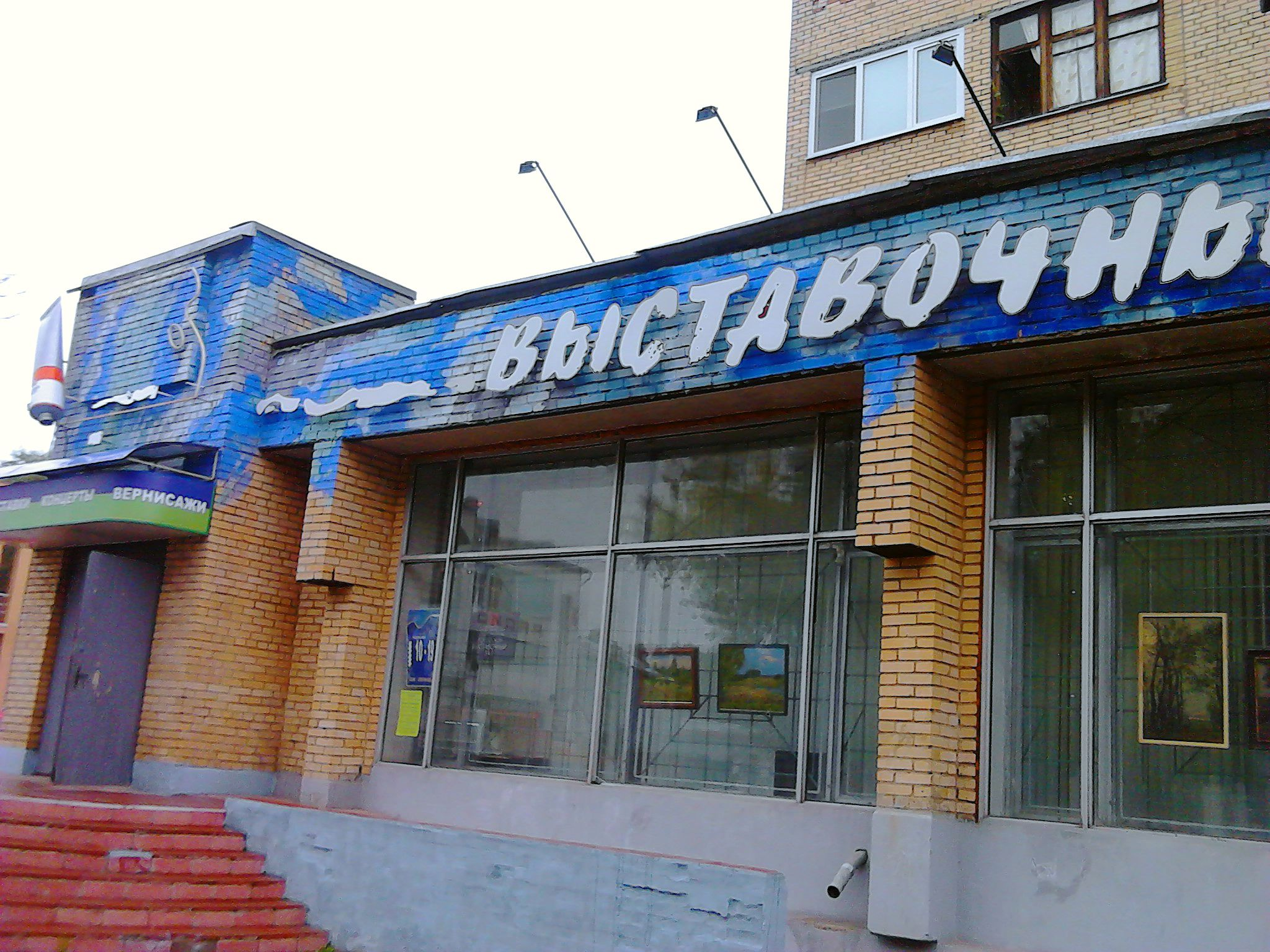 Городской выставочный зал (Орехово-Зуево), август 2013